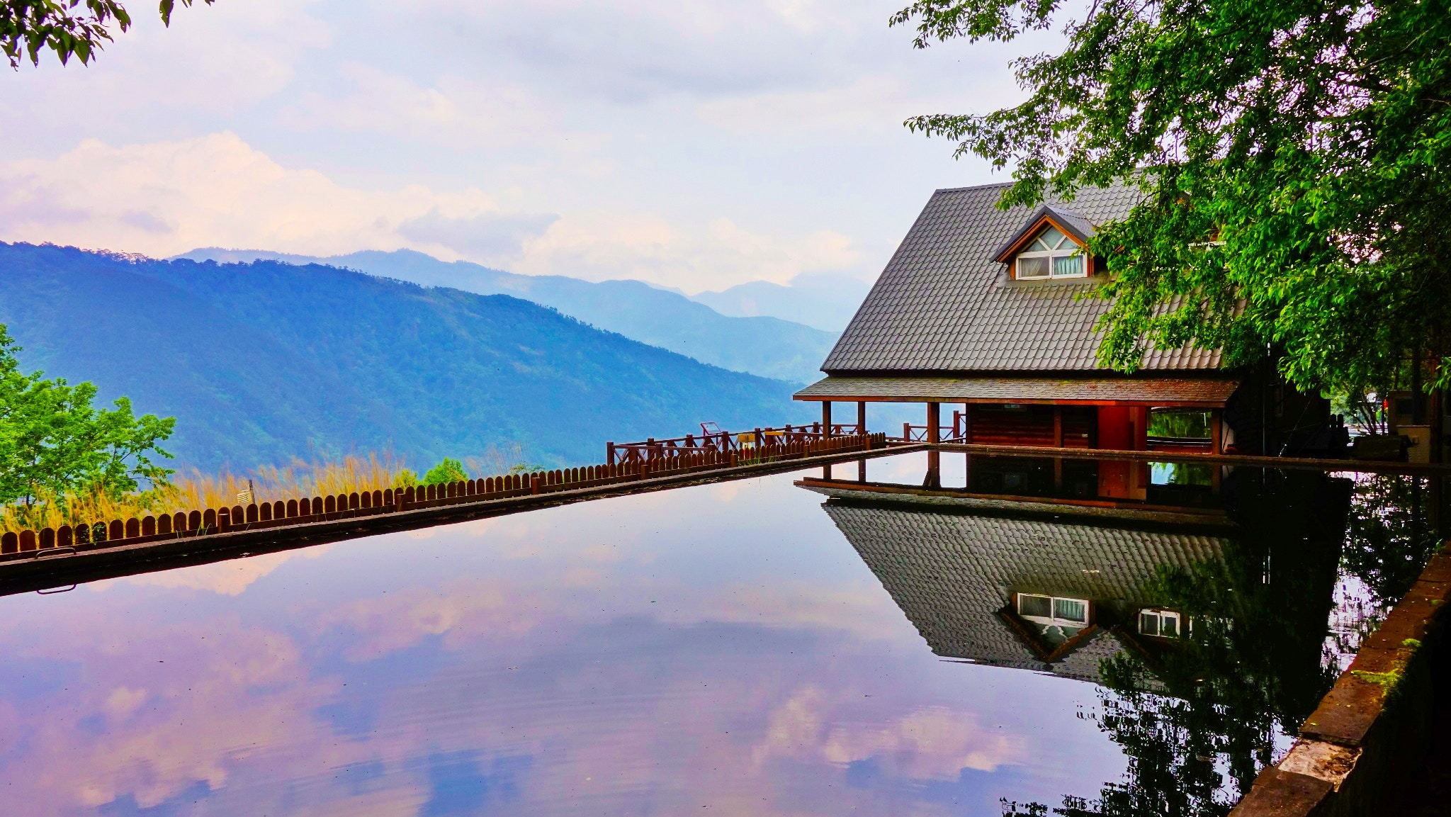 臺中市和平區武陵農場